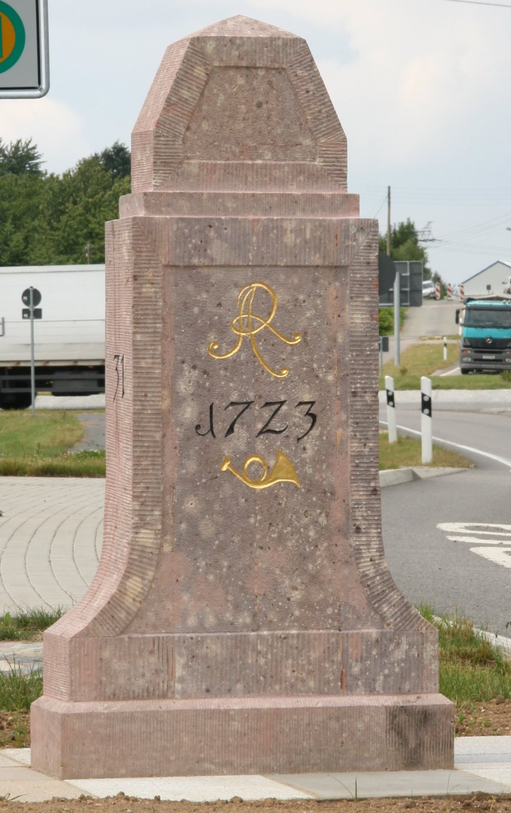 Viertelmeilenstein Roehrsdorf